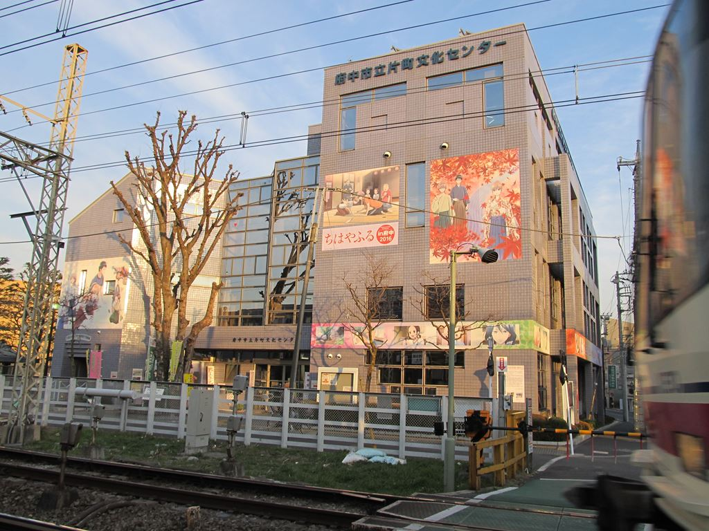 東京都府中市府中市立片町文化センター。ちはやふる。京王線。